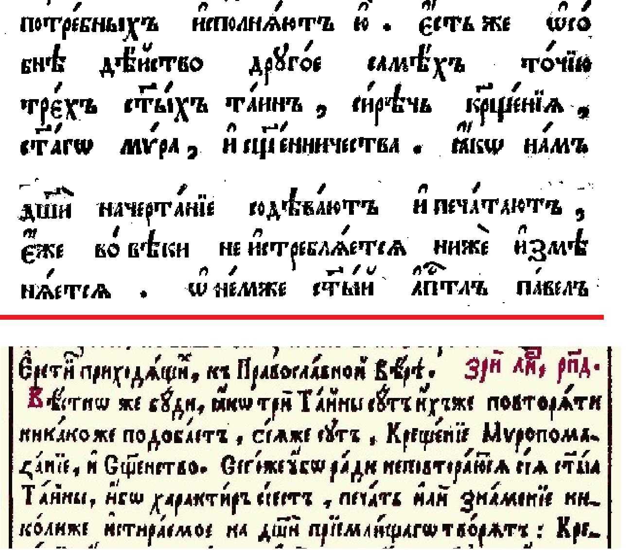 Учение о неизгладимой печати трёх таинств, изложенное Лаврентием Зизанием Тустановским в «Большом катехизисе» 1627 года и Петром Могилой в «Требнике» 1646 года.